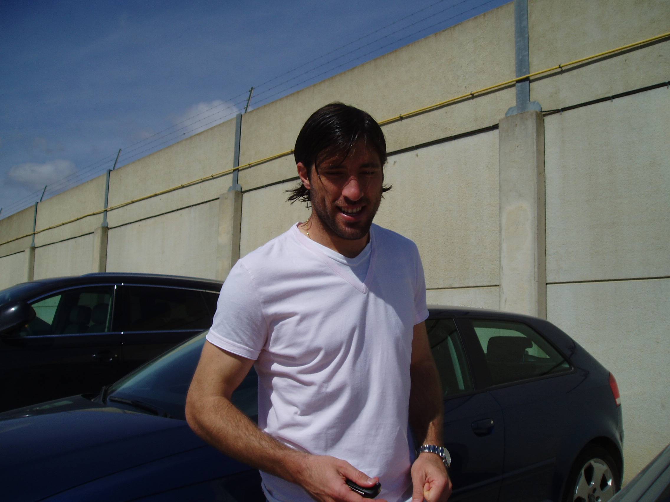 El jugador Hugo Mariano Pavone , "Pavone", a la salida de los entrenamientos